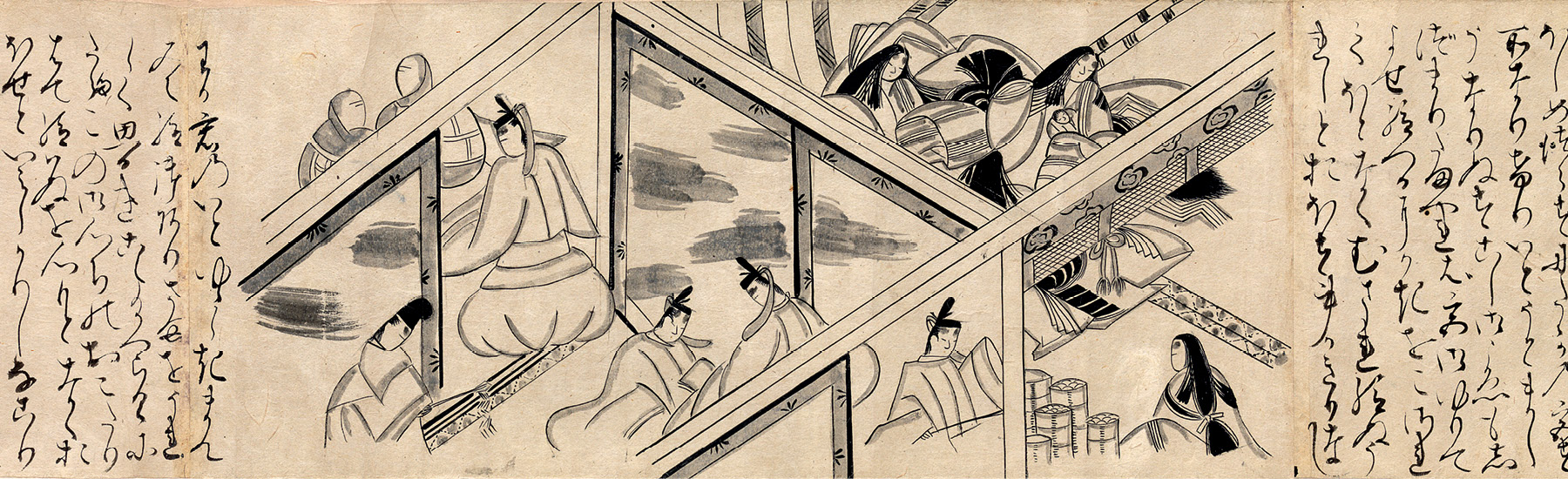 Rouleau miniature illustré du Dit du Genji, 16e, version monochrome, 12 x 572 cm. Collection Burke.